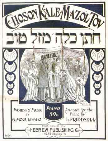 афиша МогулескоАфиша спектакля поздравляем молодожёнов Могулеско